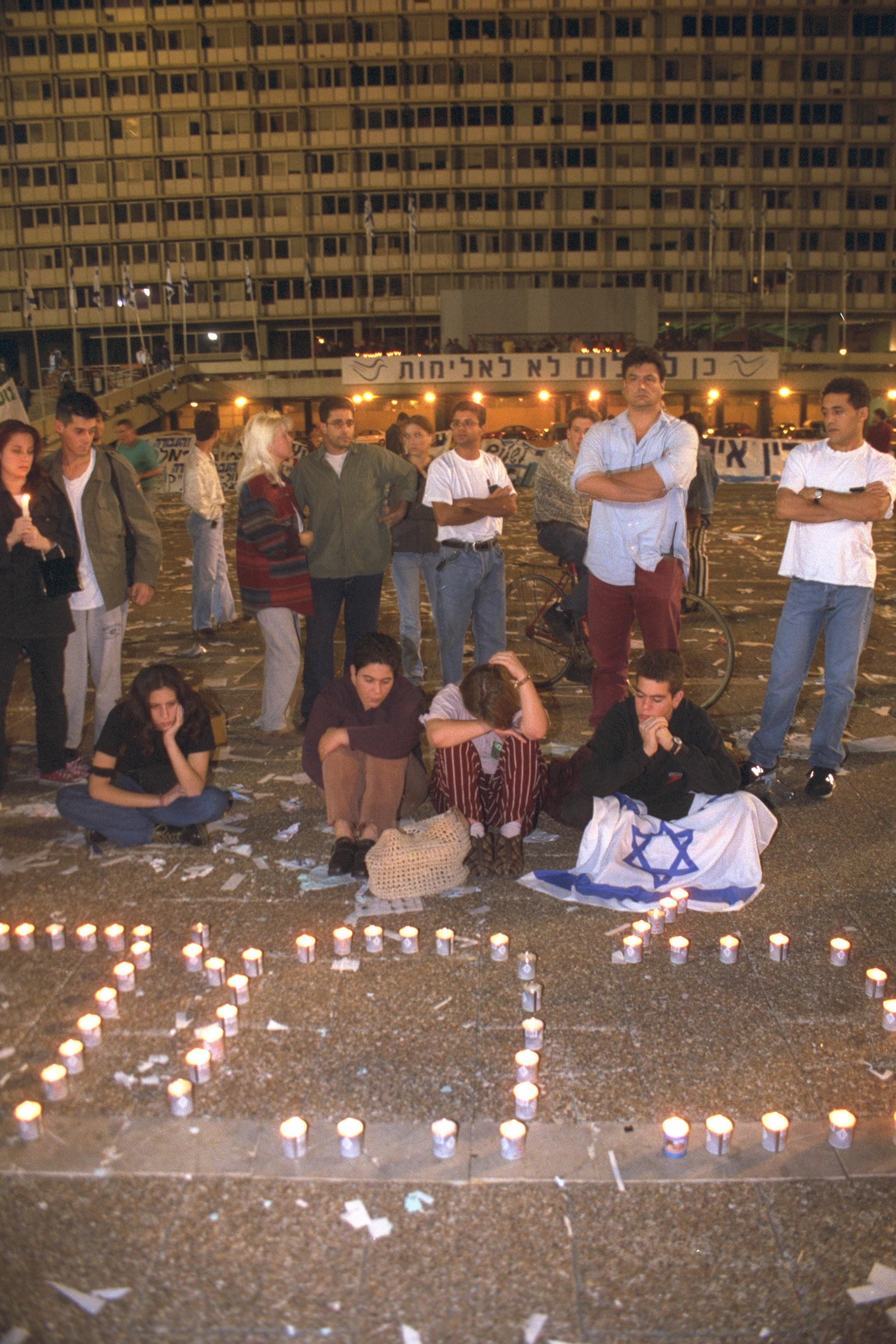 Teenagers lighting memorial candles in Tel Aviv's Malchei Yisrael square after hearing of the assassination of P.M. Yitzhak Rabin during a peace rally. נערים ונערות מדליקים נרות זיכרון בכיכר מלכי ישראל בתל אביב, לאחר פרסום ההודעה על מותו של רהמ יצחק רבין שנורה על ידי מתנקש בעצרת למען השלום 11/04/1995